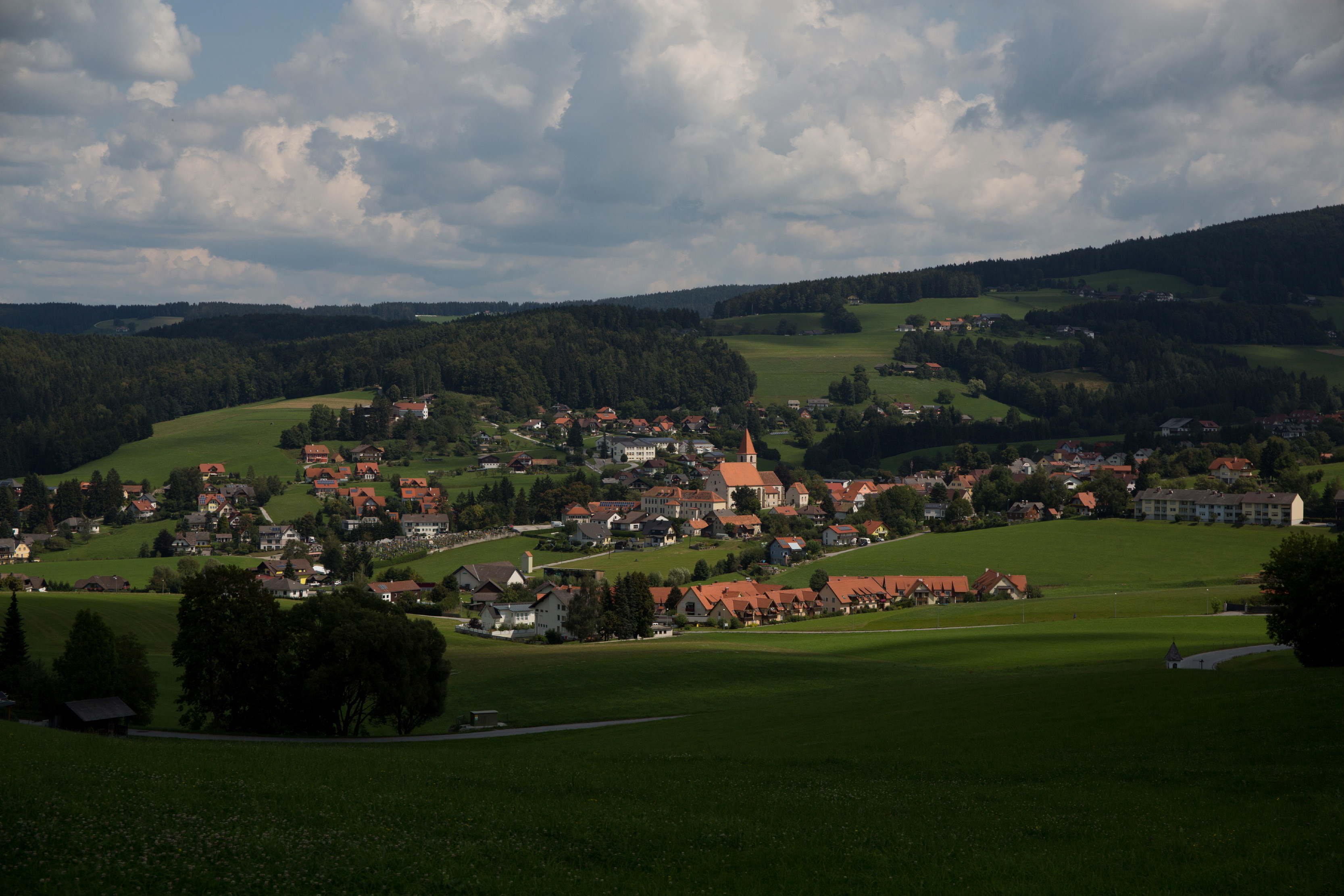 Semriach in der Steiermark vom Kogel aus gesehen. Austria